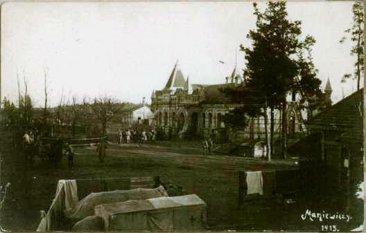 Залізничний вокзал в Маневичах. Фото 1913 р.